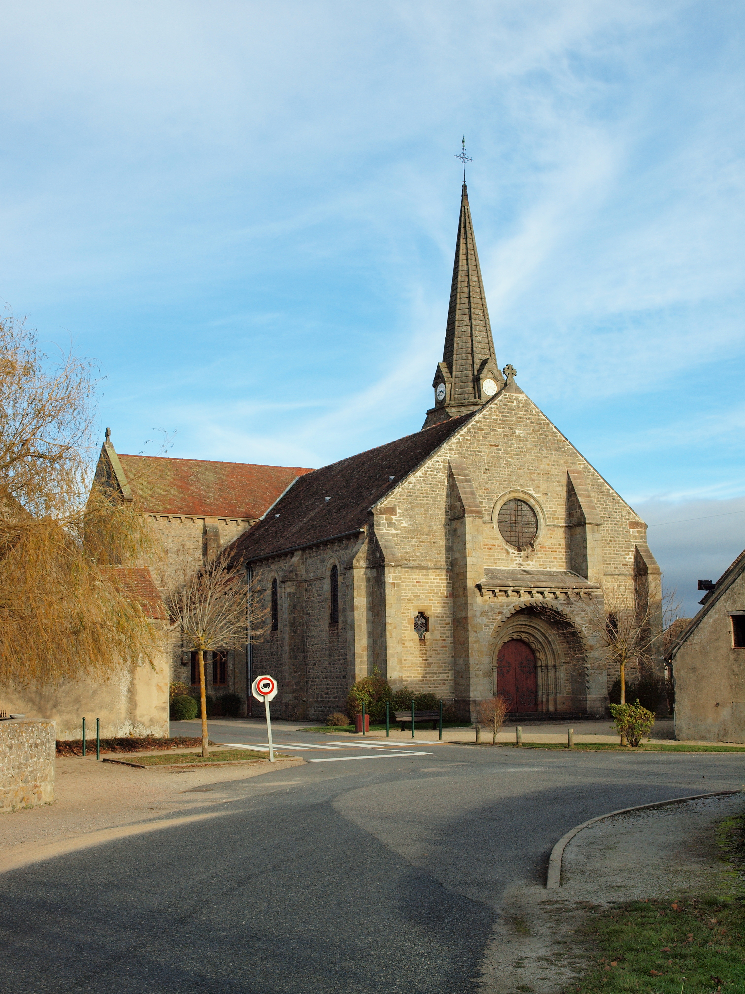 Cressanges (Allier, France)